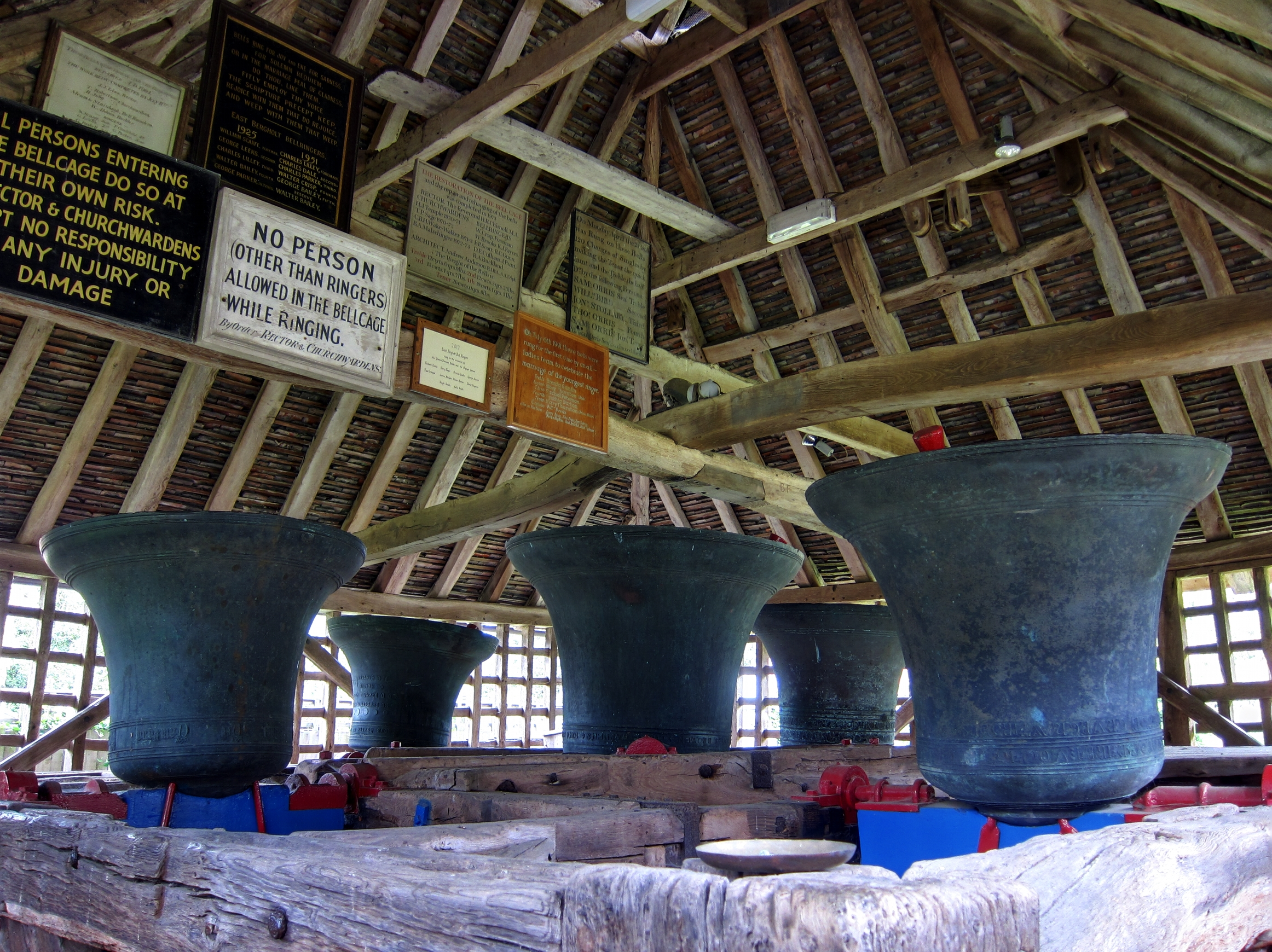 Les cloches de l'église St Mary, à East Bergholt.